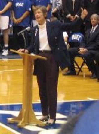 Nan Keohane talking before Alana Beard's jersey retirement